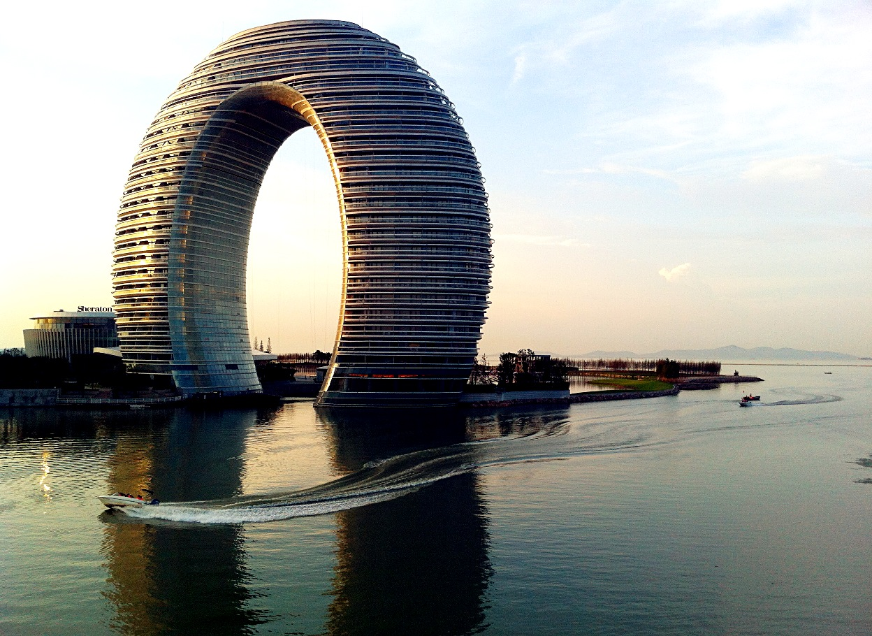 中国湖州喜来登温泉度假酒店（月亮酒店）